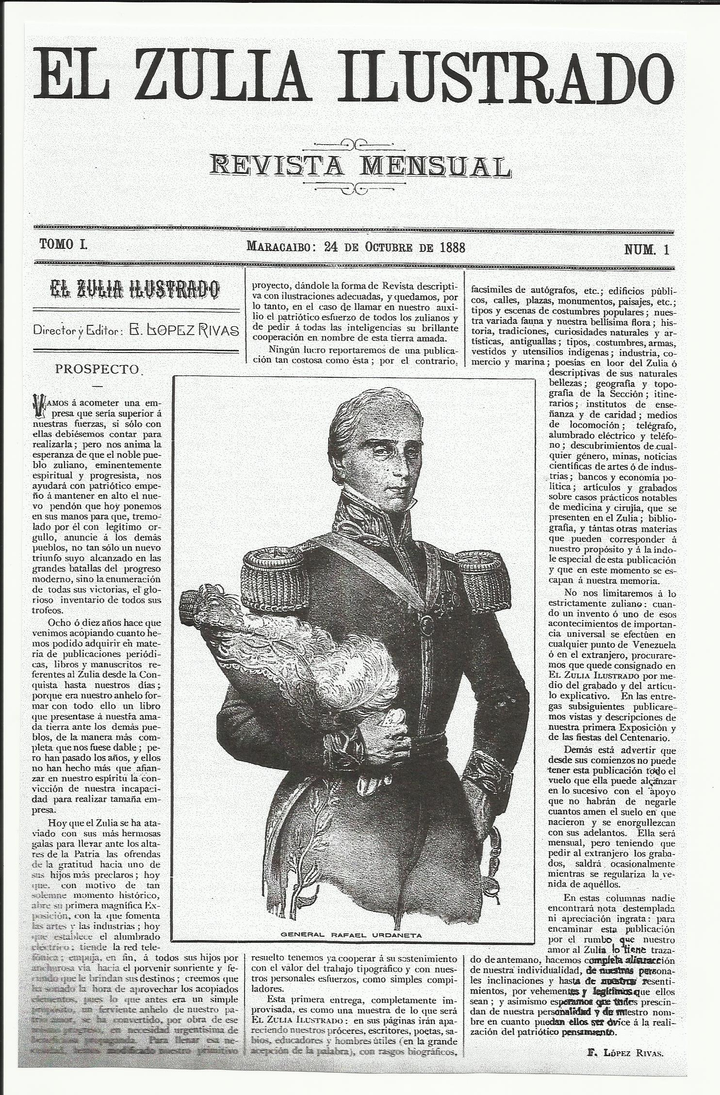 Grabado del General Rafael Urdaneta, realizado por Eduardo López Rivas en el primer número de la revista "El Zulia ilustrado".